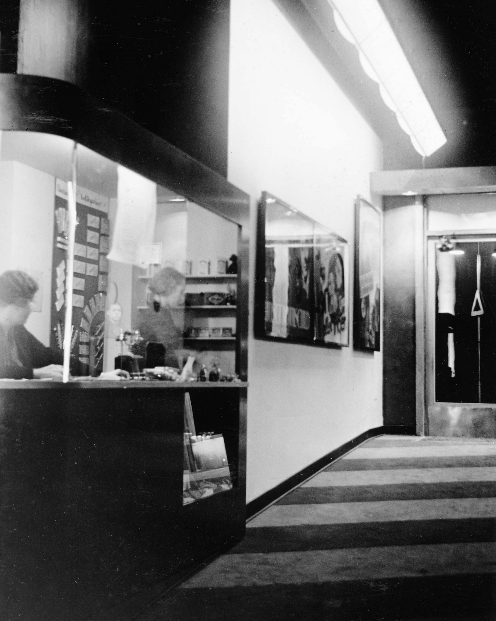 Pallas-Teatern, Biograf Carlton, Vallingatan 34